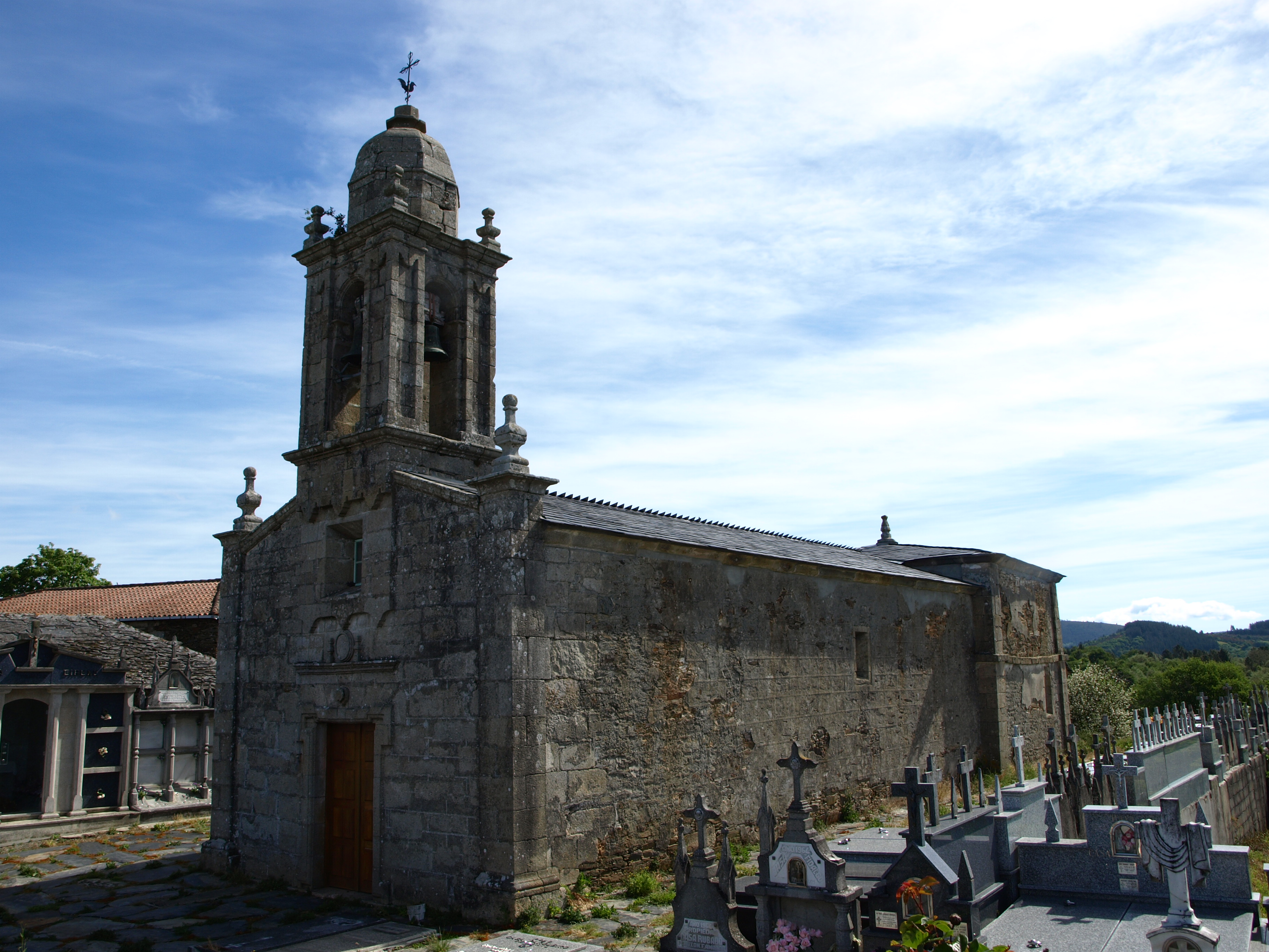 Igrexa parroquial de Vilaesteva (O Saviñao)